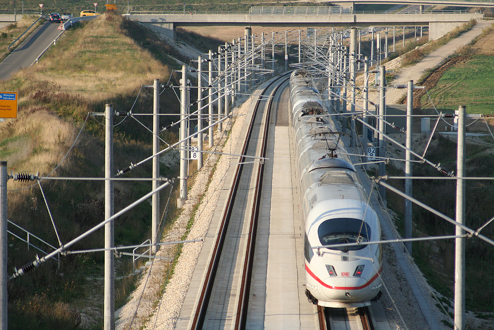 Ein ICE 3 auf der Schnellfahrstrecke Nürnberg–Ingolstadt–München kurz hinter Ingolstadt.